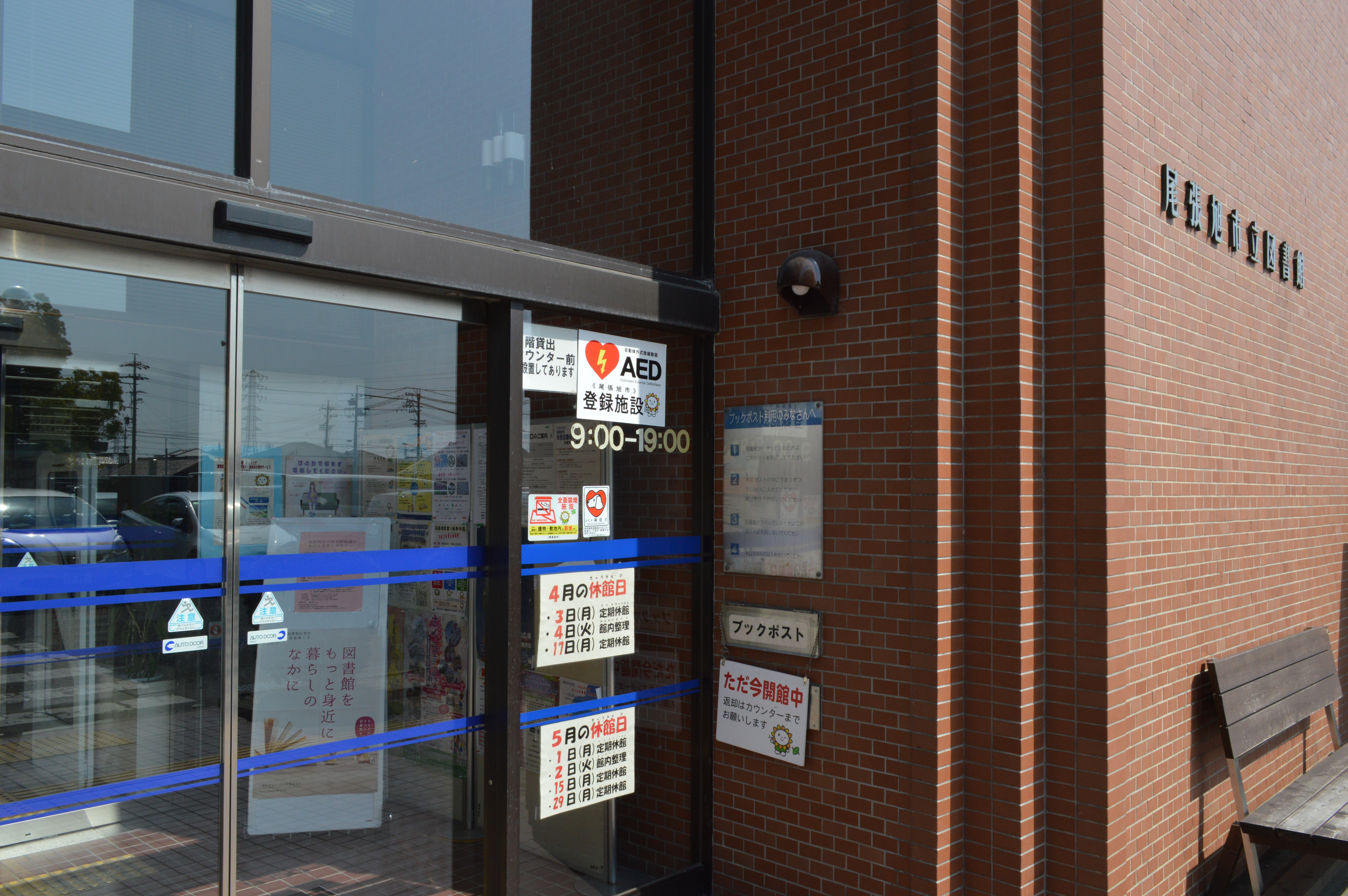 愛知県尾張旭市の尾張旭市立図書館の入口。入口右側にブックポスト。